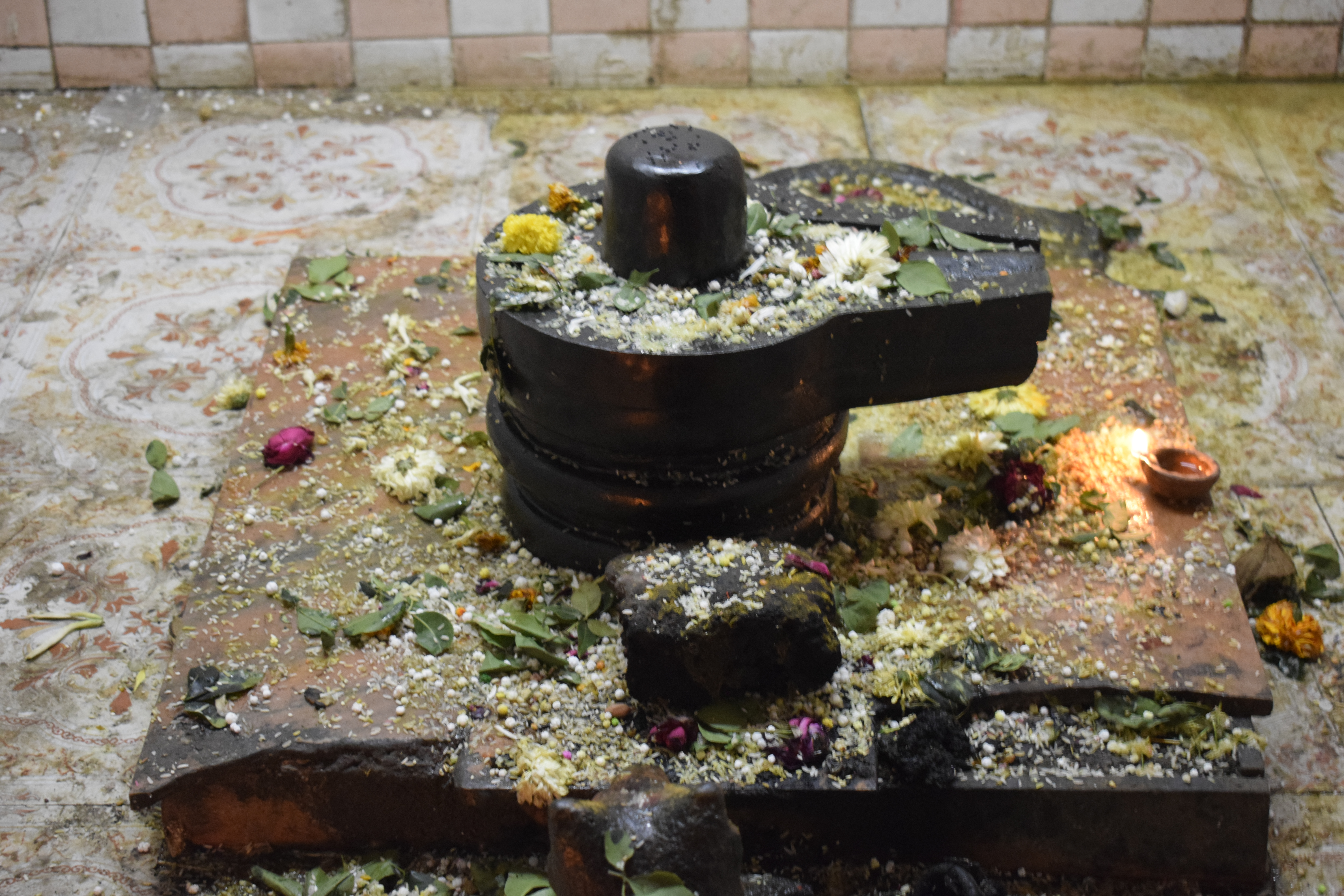 श्री जंबुकेश्वर लिंग